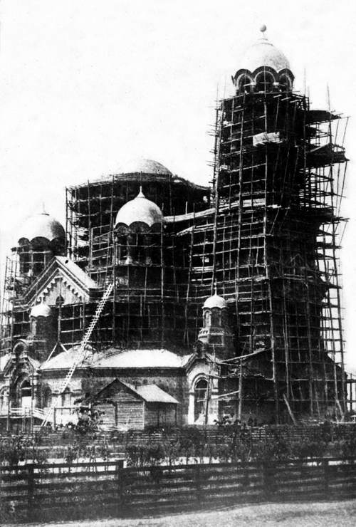 Самара. Строительство Кафедрального собора. Фотография. ~1880-е годы.